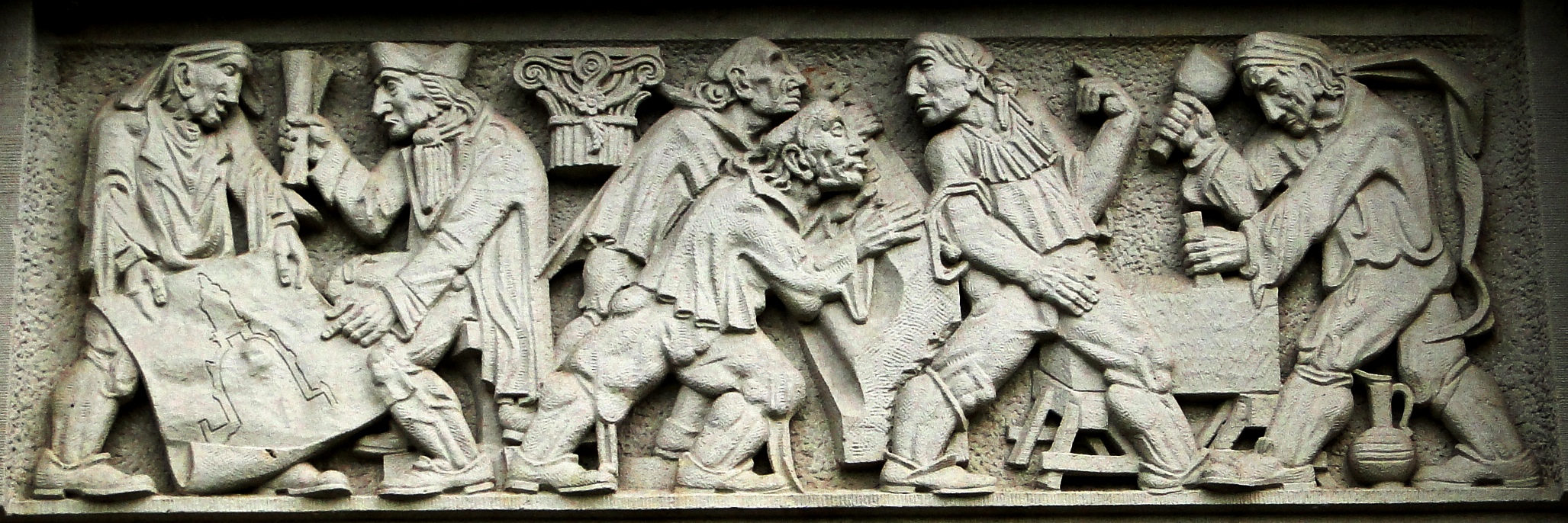 dd